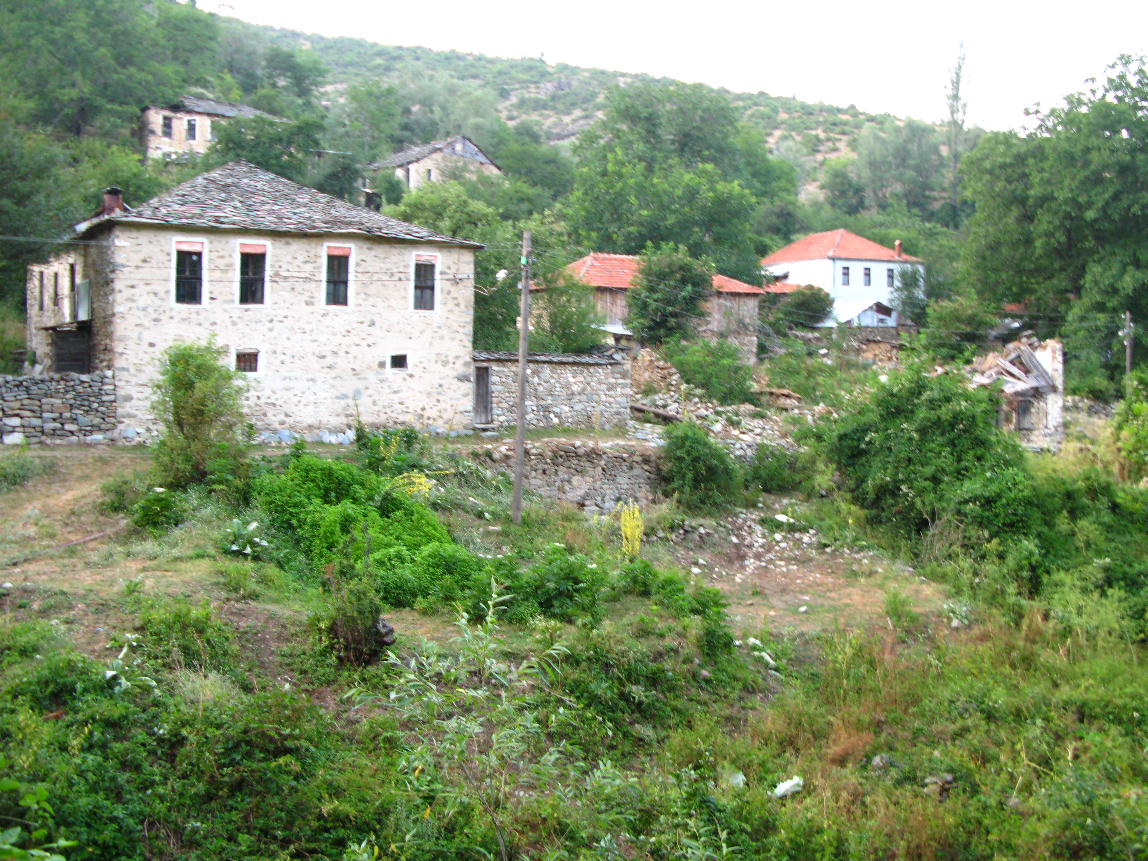 Битолското влашко село Маловище, Република Македония.